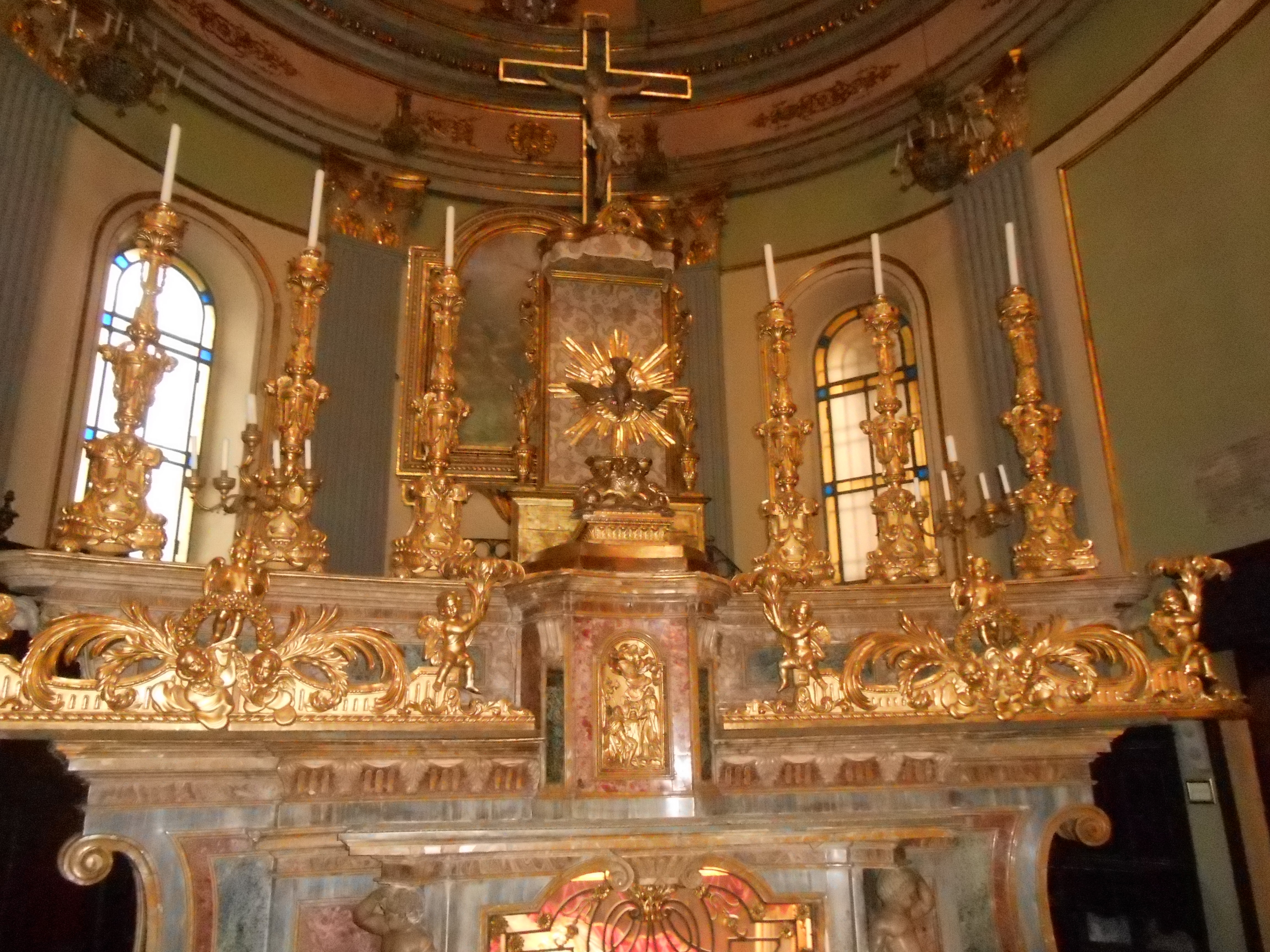 Altare Maggiore della chiesa di Santo Spirito di Torino.